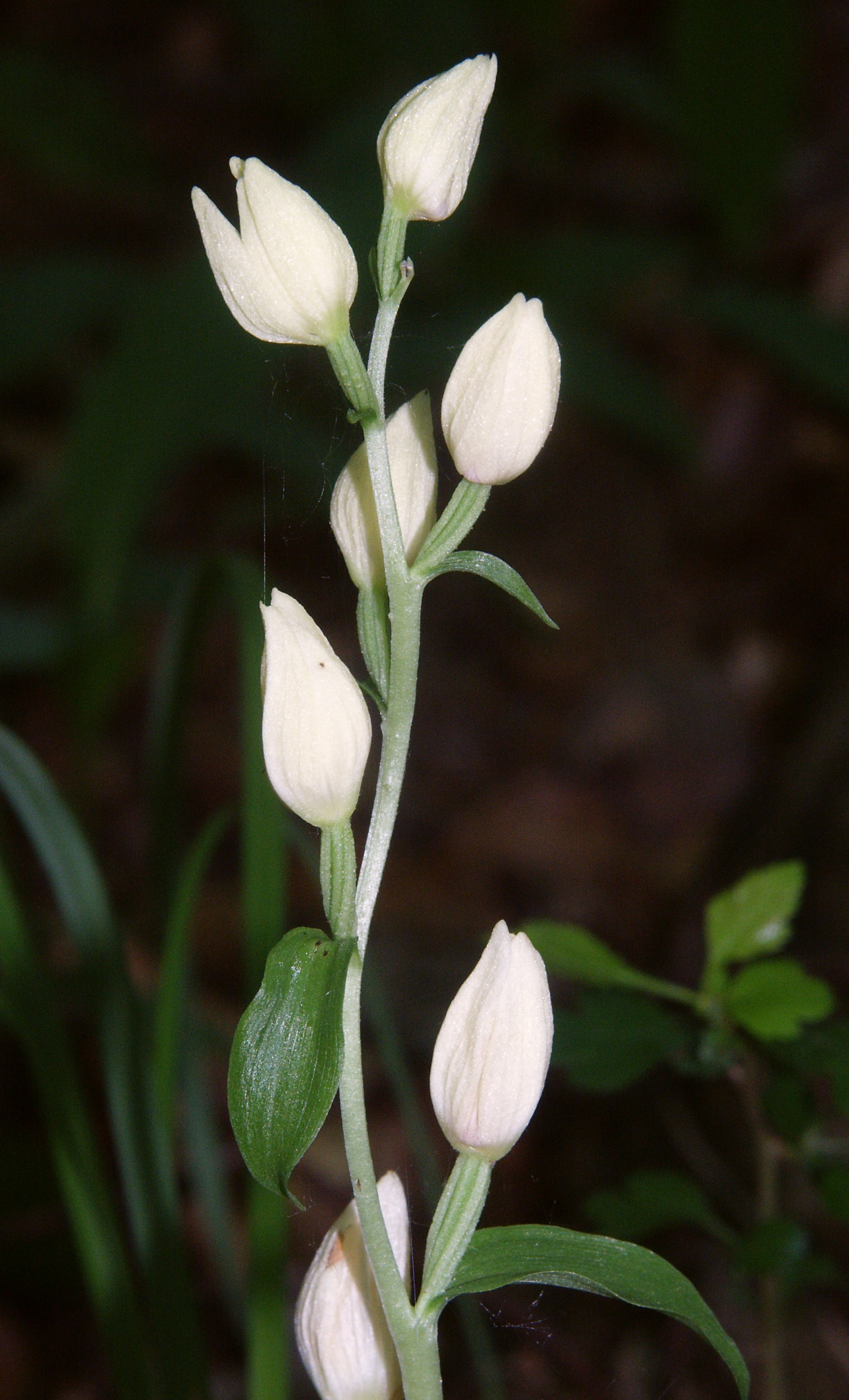 Cephalanthera damasonium, Schwäbisch-Fränkische Waldberge, Germany